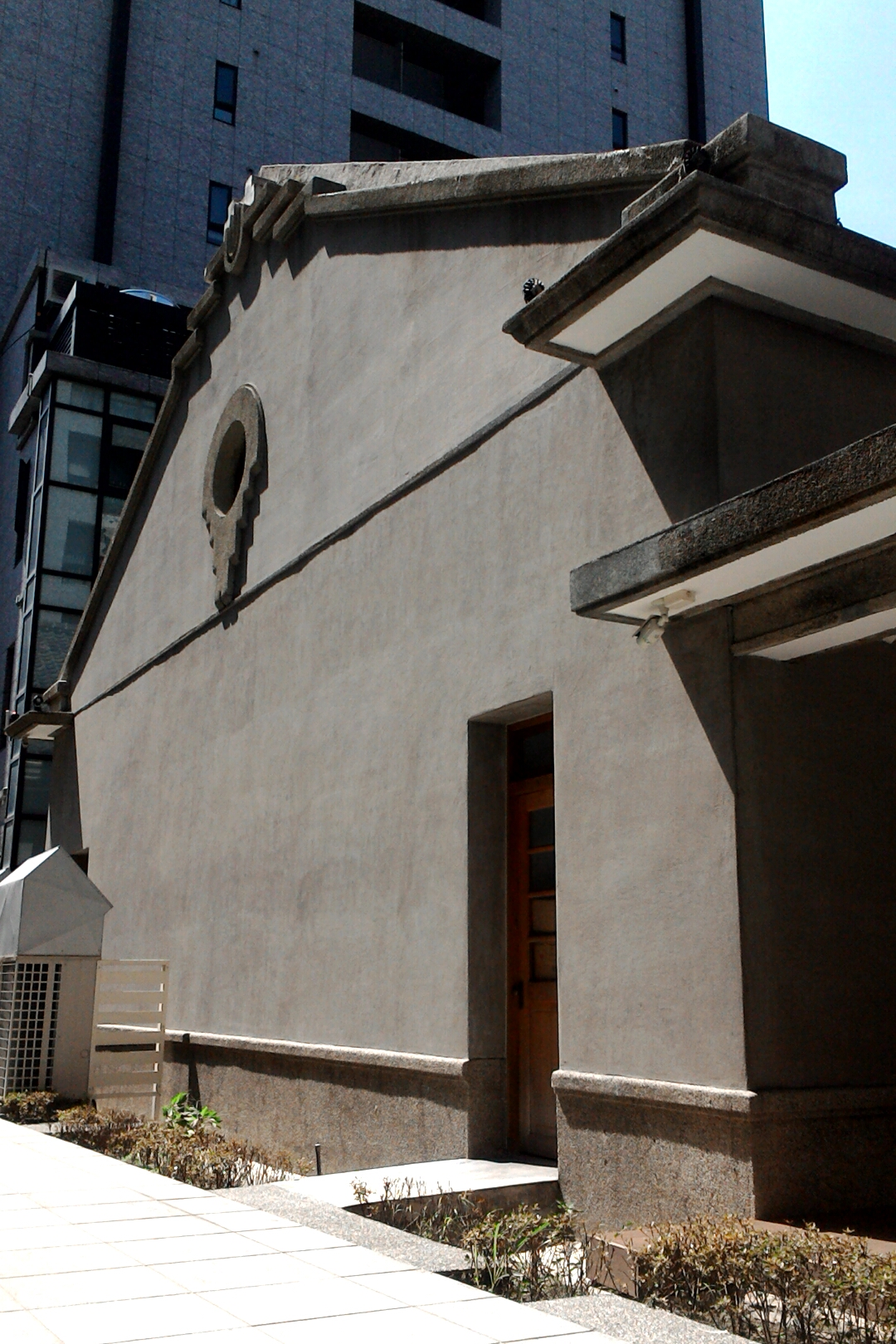 內湖庄役場會議室背側,台北市內湖區金龍次分區湖濱里